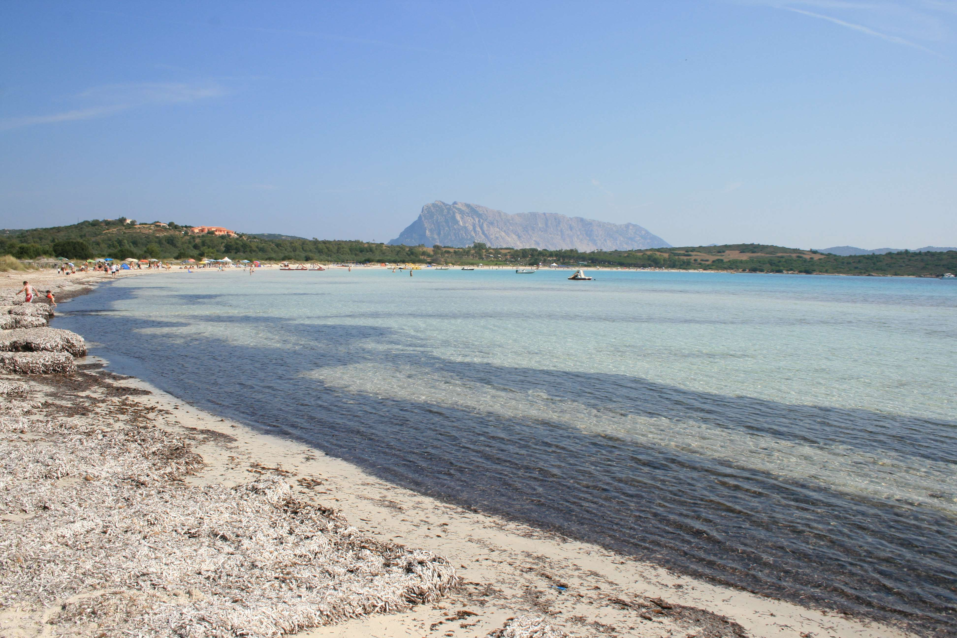 Spiaggia di Brandinchi